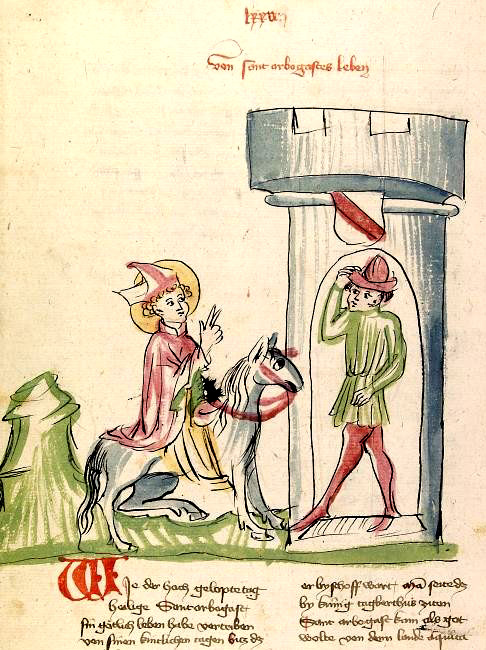 St. Arbogast by Srtasburg ru: святой Арбогаст въезжает в Страсбург